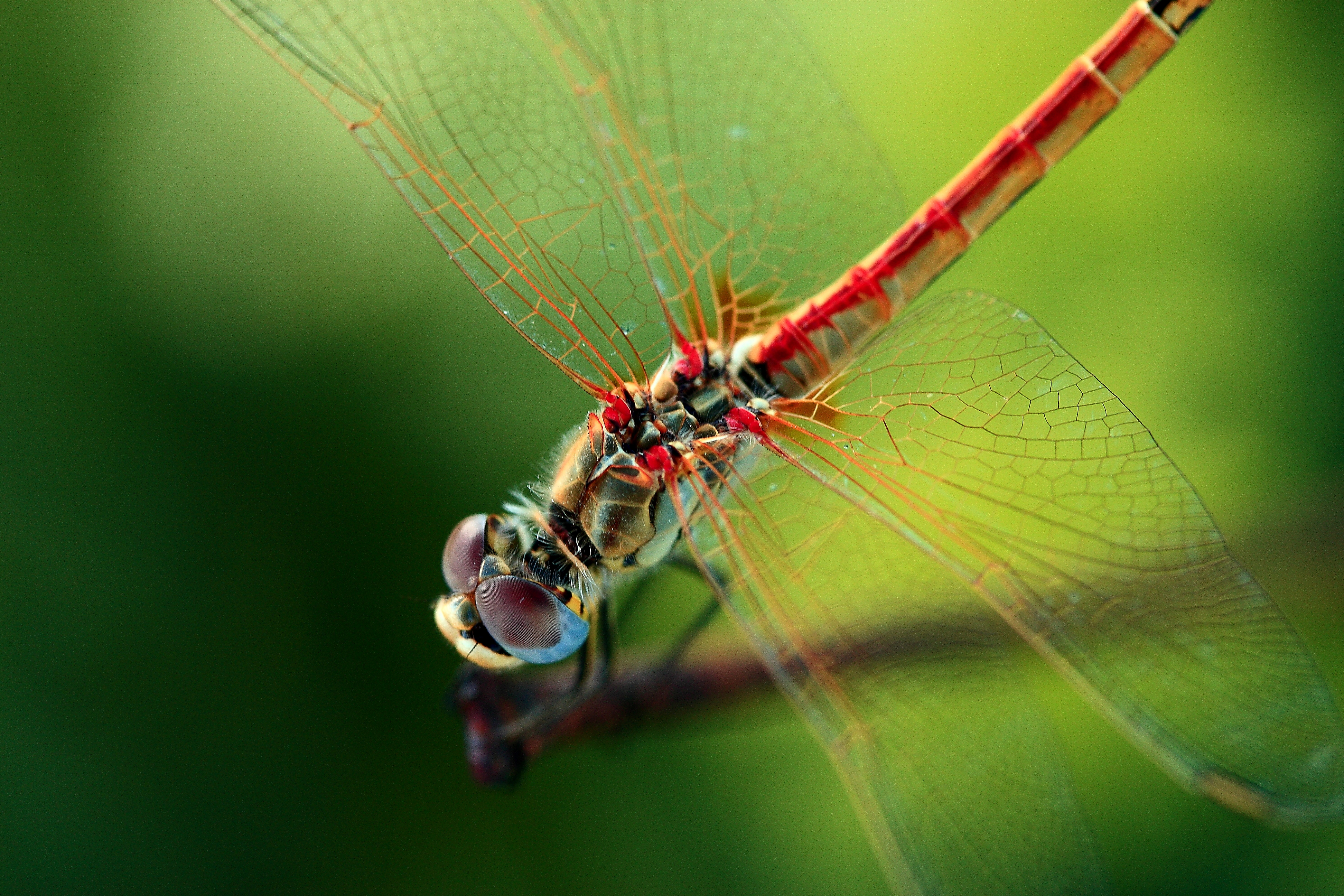 libellula